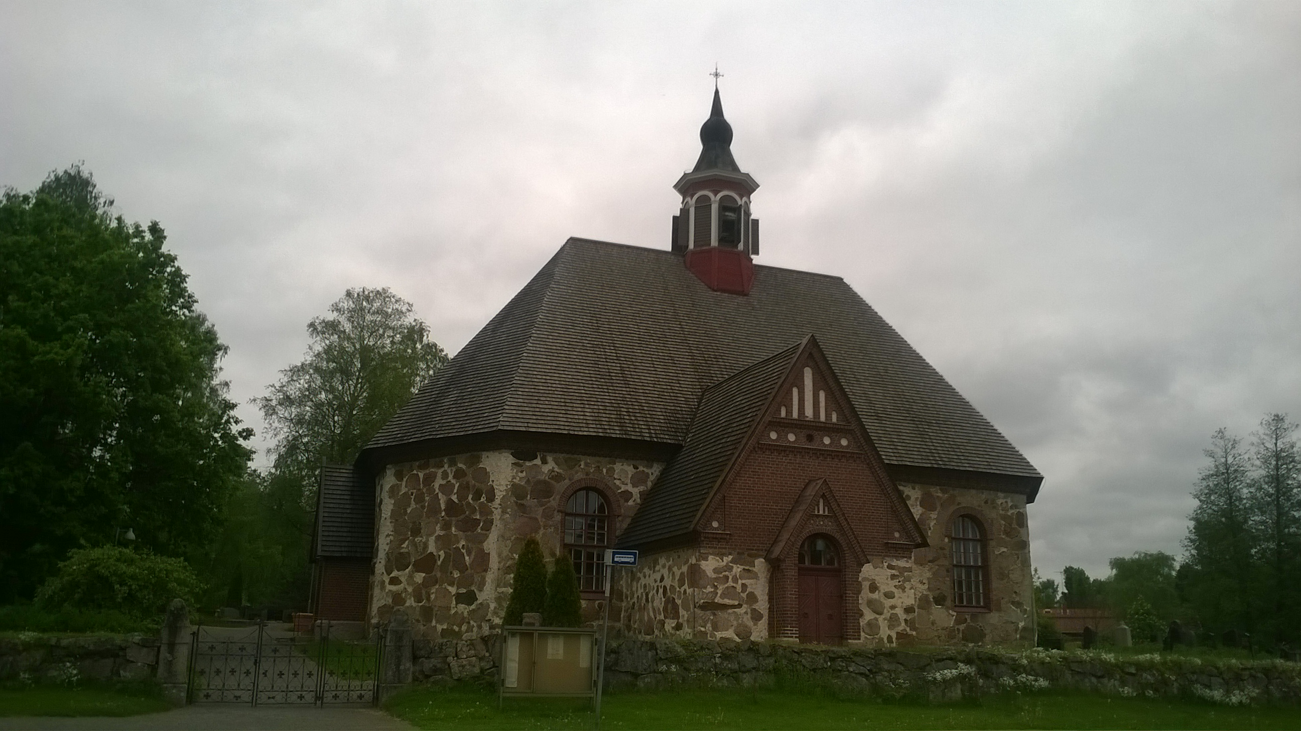 Rengon kirkko